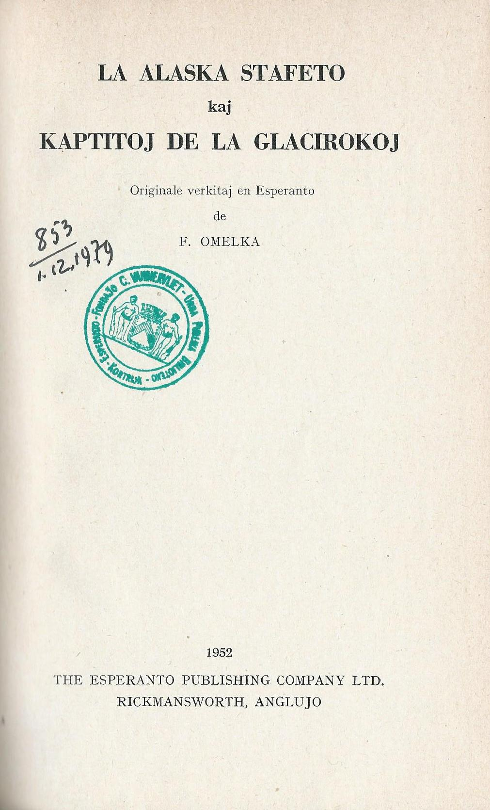 librokovrilo de "La Alaska Stafeto & Kaptitoj de la Glacirokoj", 1952